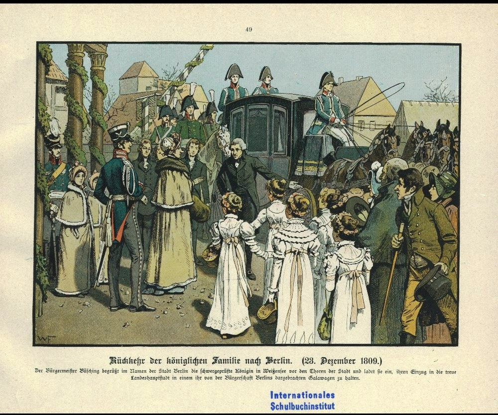 "Die Königin Luise in 50 Bildern für Jung und Alt", Verlag Paul Kittel, Berlin 1896. "Königin Luise zurück in Berlin, 1809"